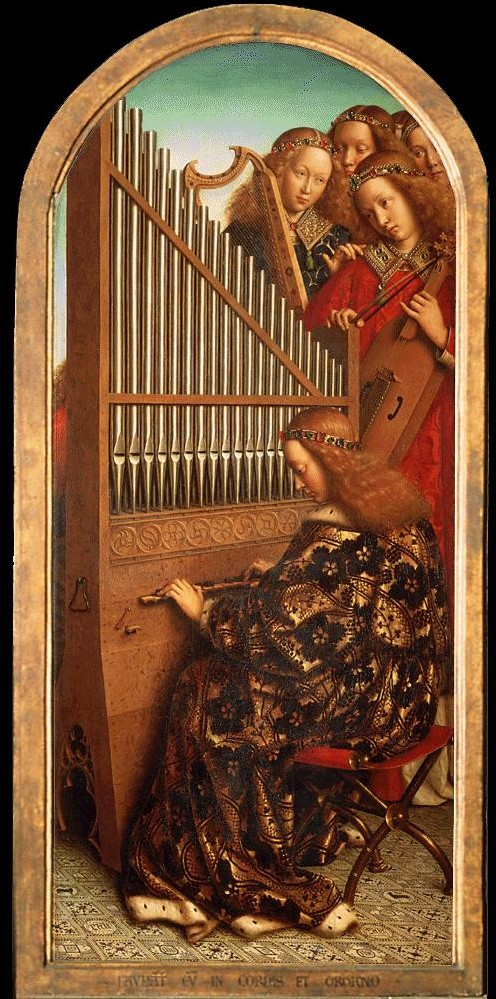 Ghent Altarpiece